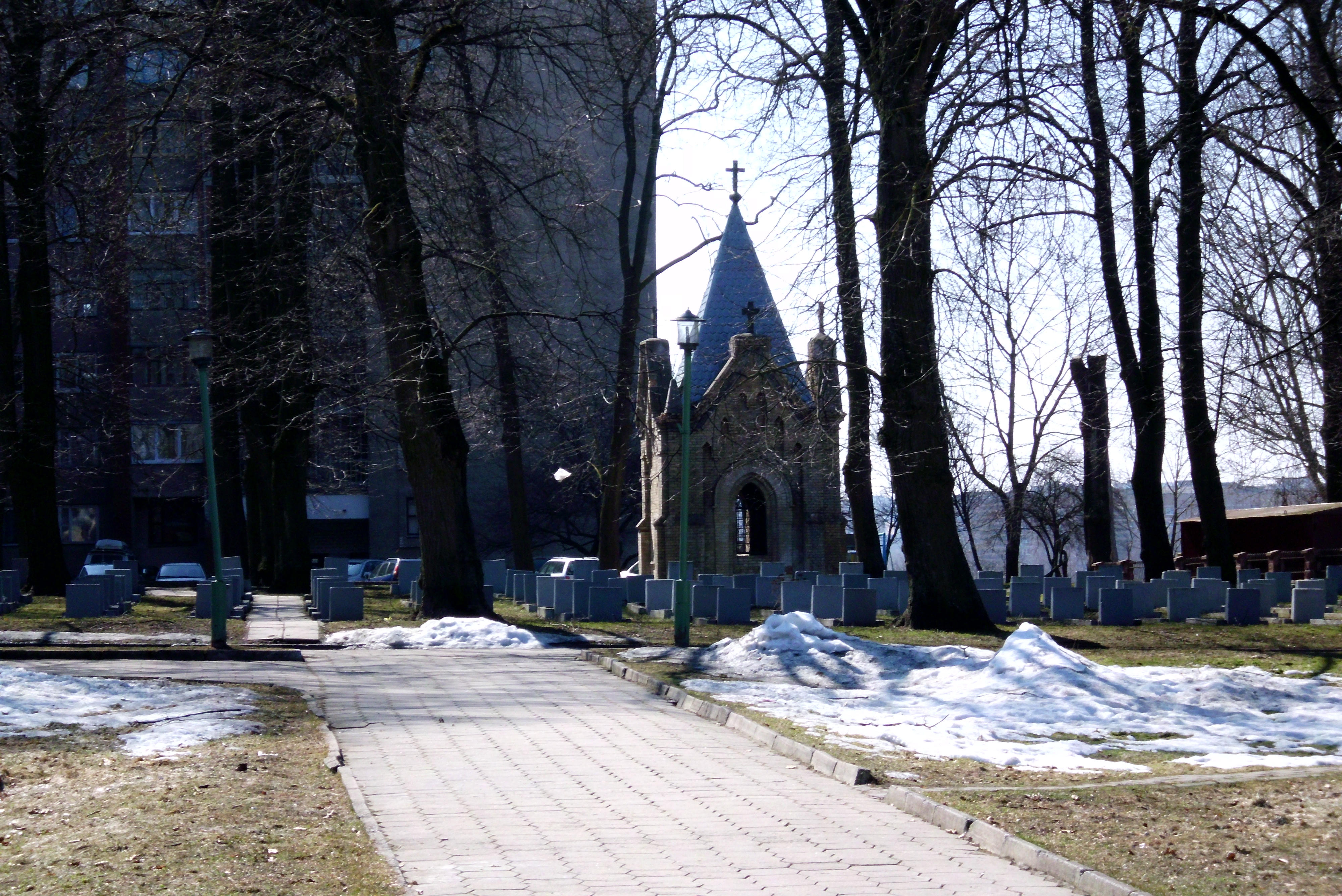 Kwiecień 2013